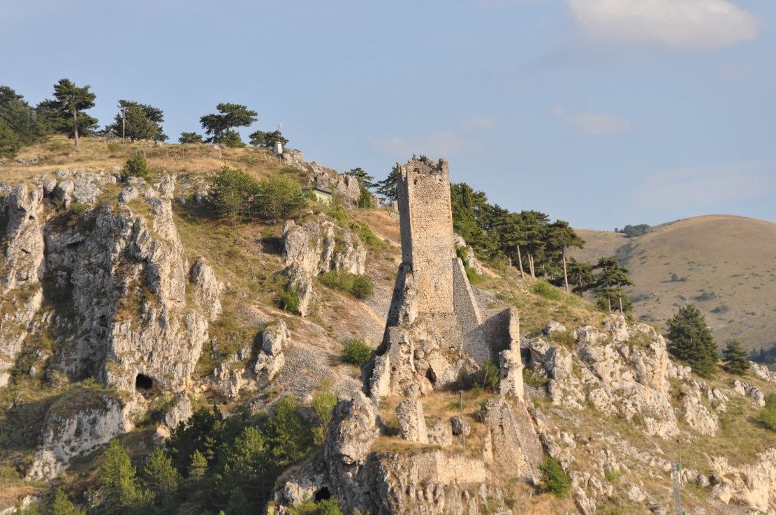 Pescina 2012